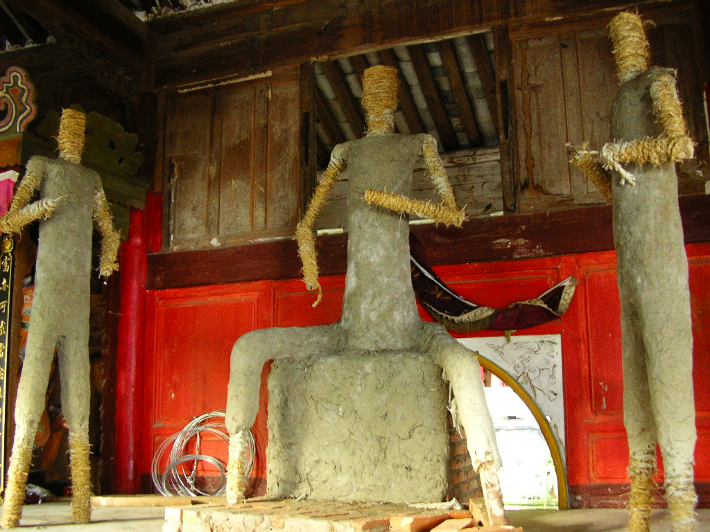 Goetterrestaurierung in Heshun bei Tengchong